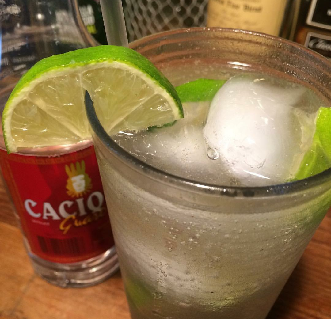 Versión en jpg del archivo